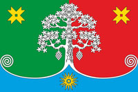 Флаг Сегежского района, Карелия